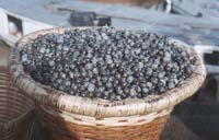 Açaí wird in Körben zum Markt transportiert und dort an Zwischenhändler verkauft